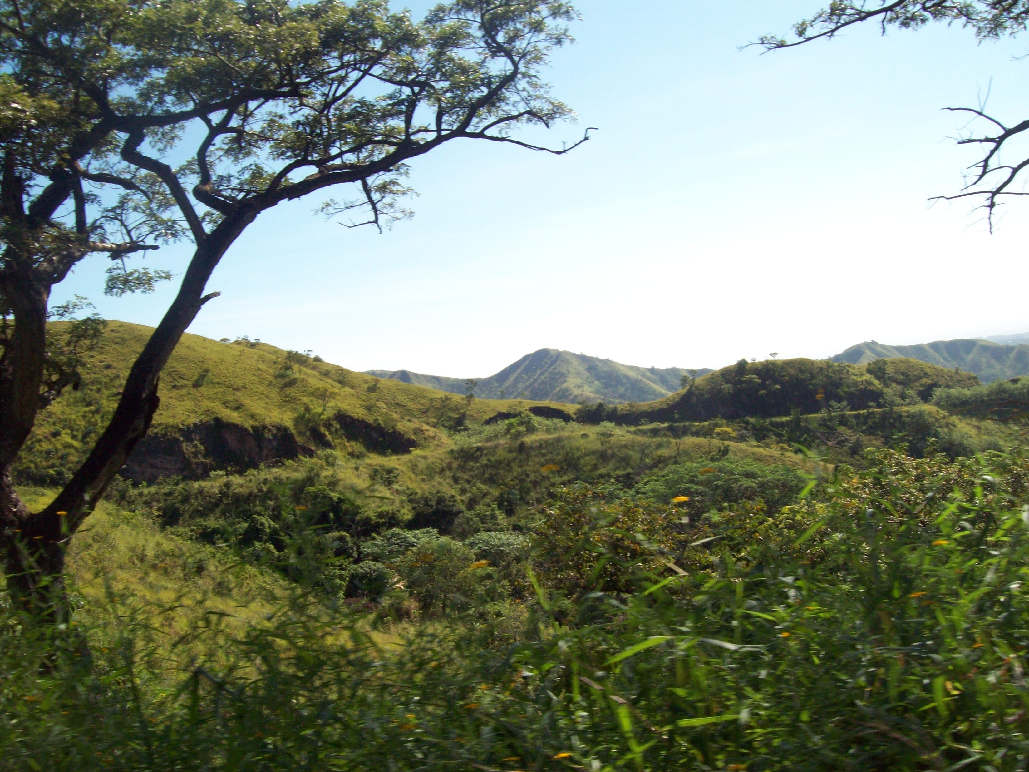 siembra